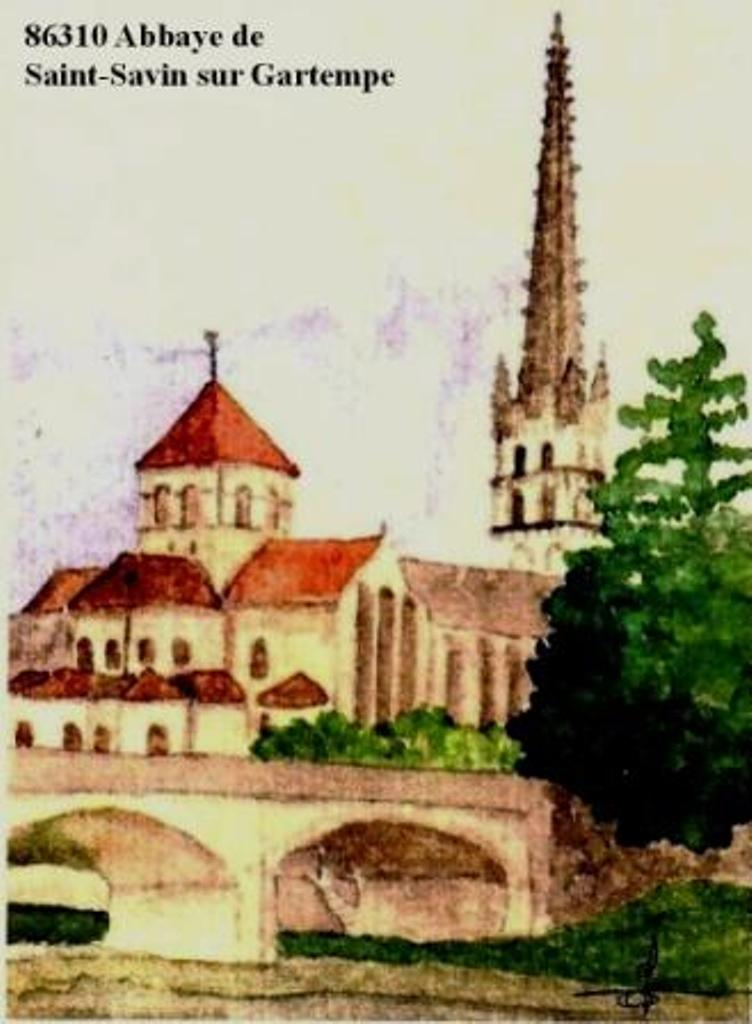 Dessin N° 03 de Saint-Savin-sur-Gartempe